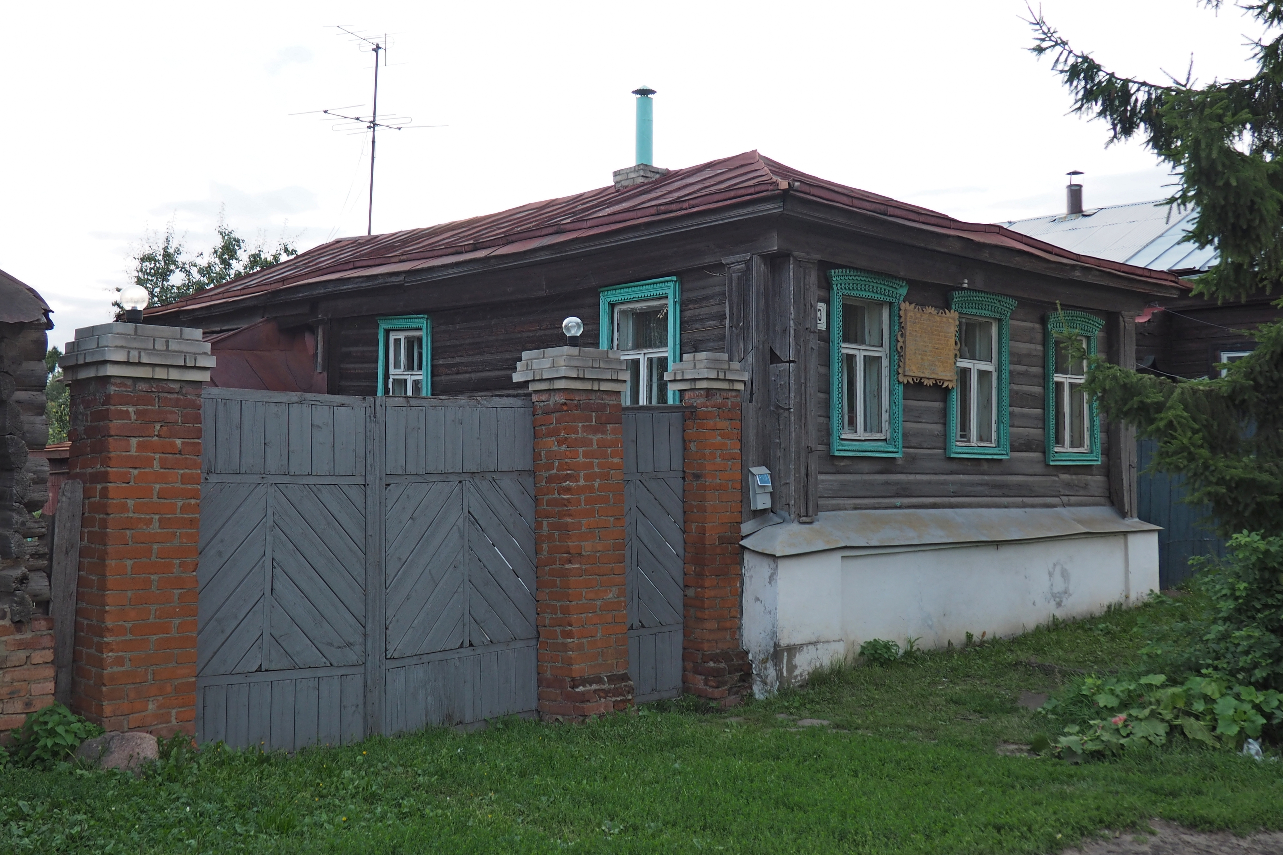 Дом Фирсова: улица Старая, 13, Суздаль, Суздальский район, Владимирская область